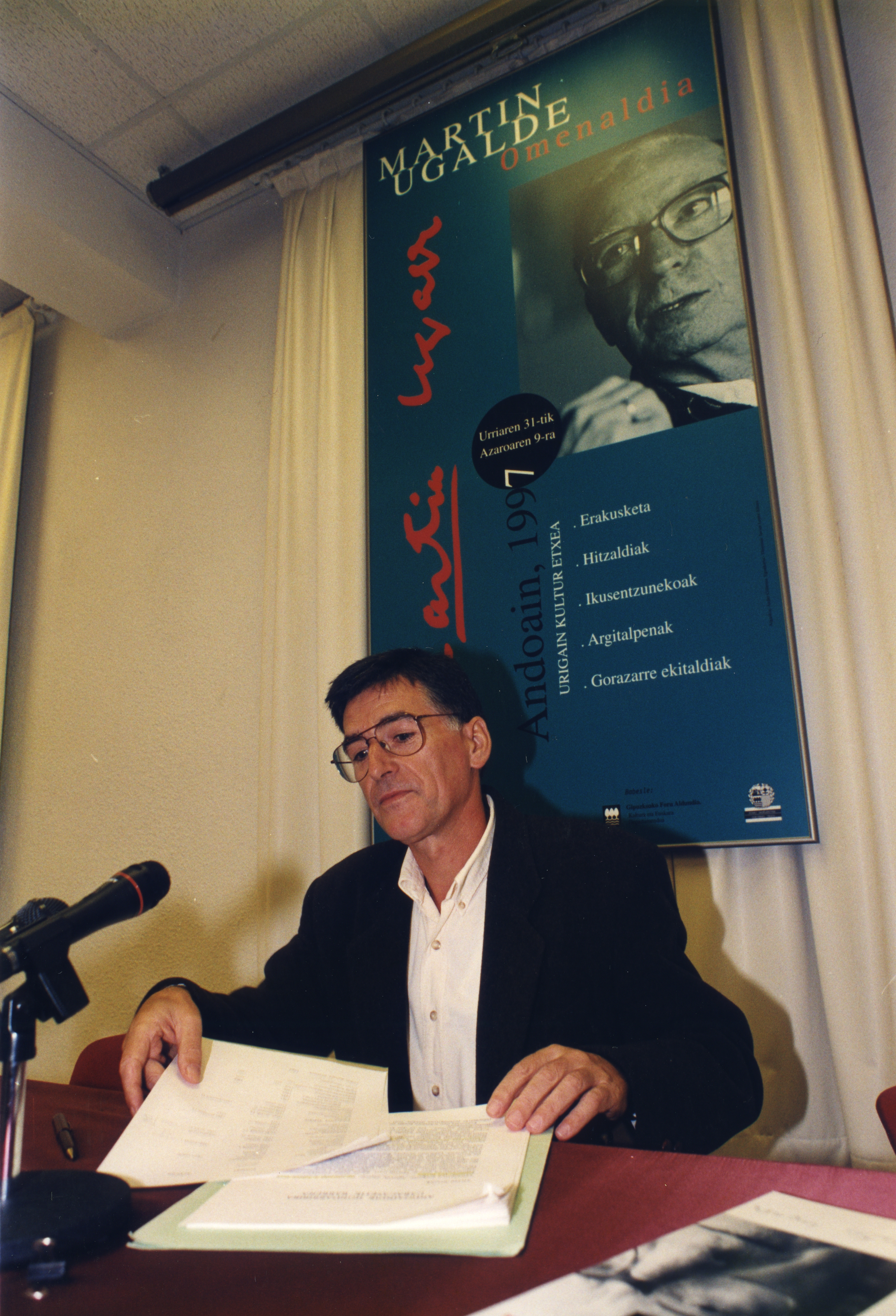 Aiurri 68 zbk. 17. orr.